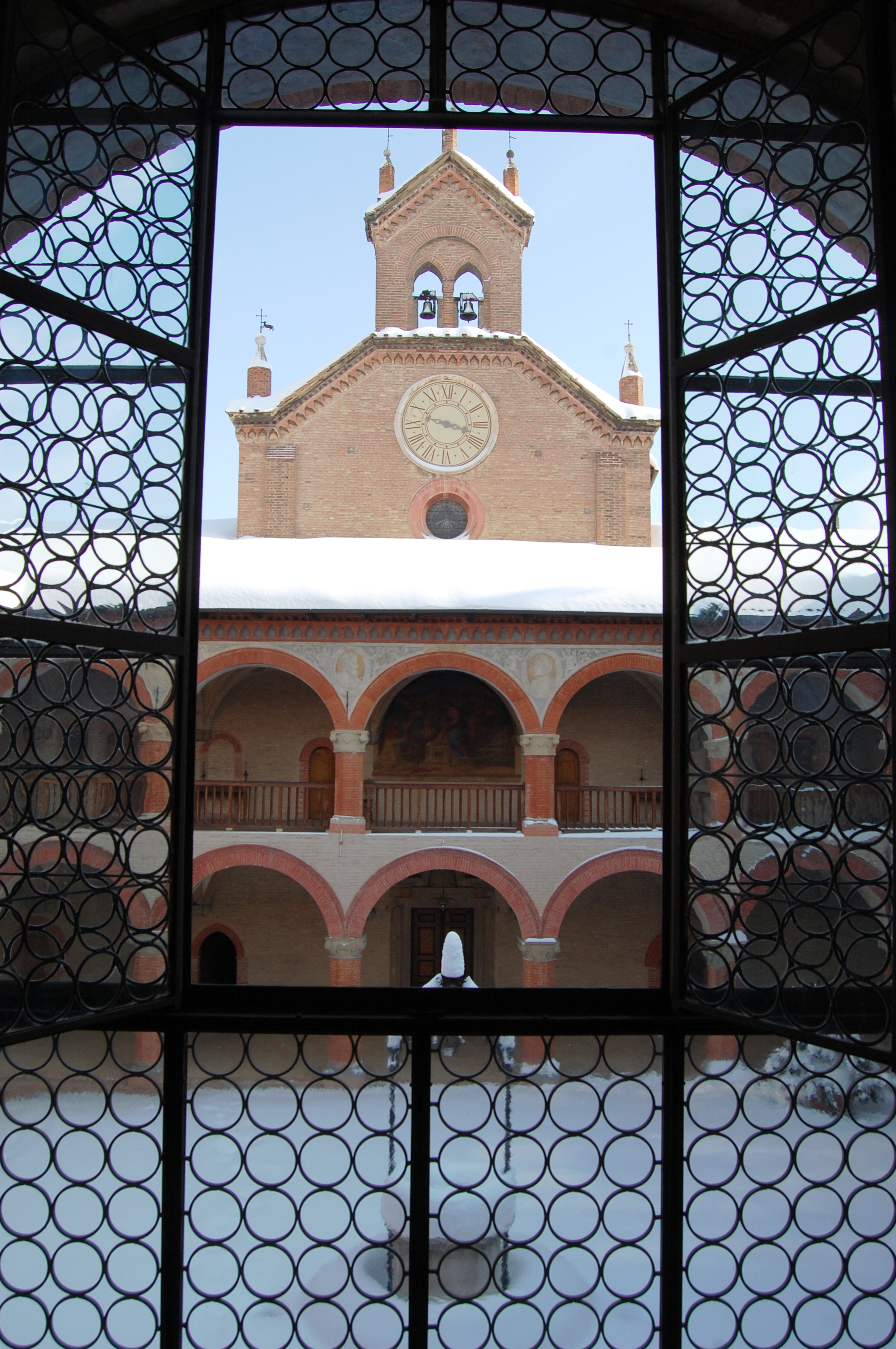 Patio del Real Colegio de España en Bolonia.